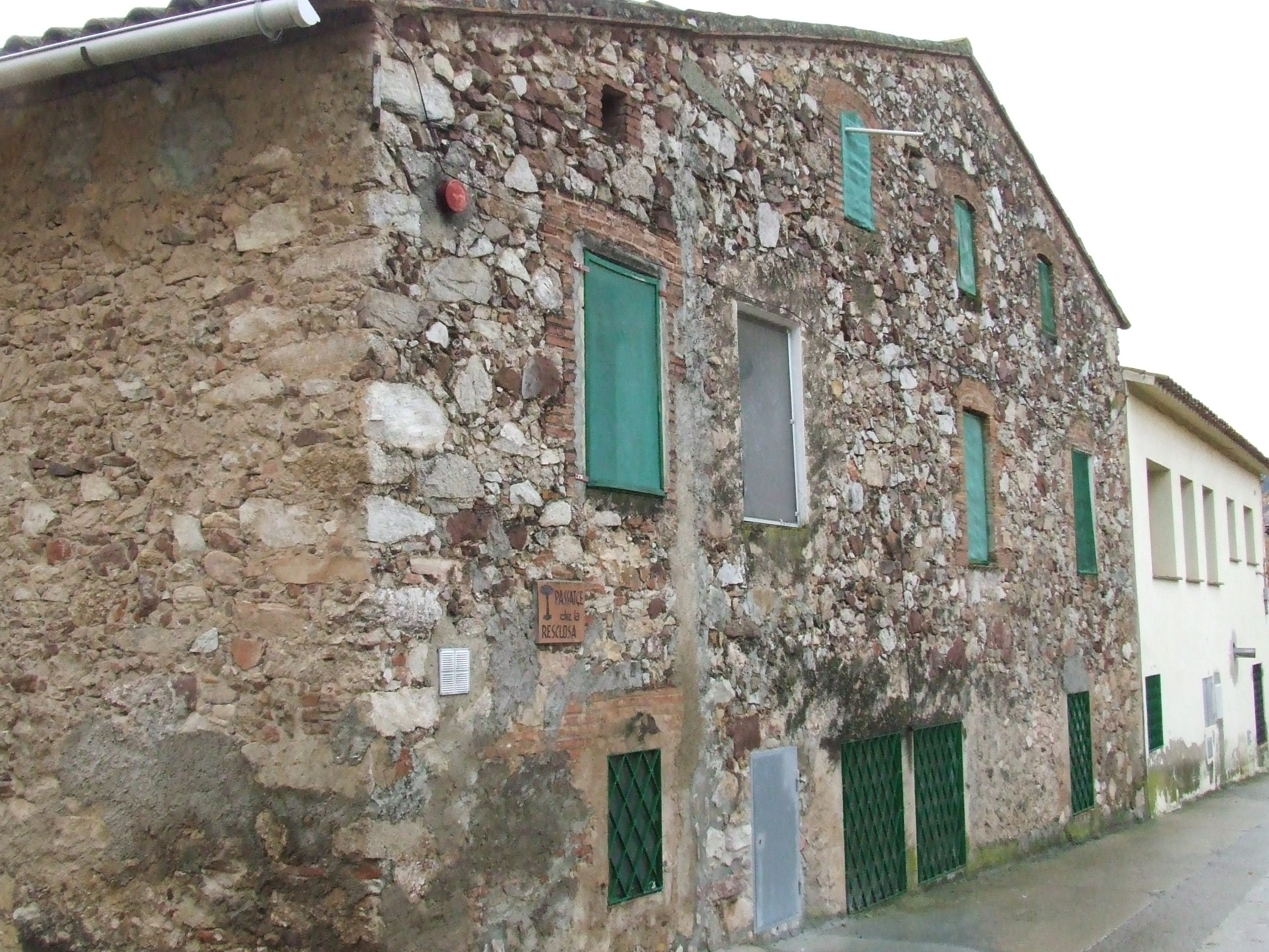 Can Prat Nou (Bigues, Bigues i Riells, Vallès Oriental)